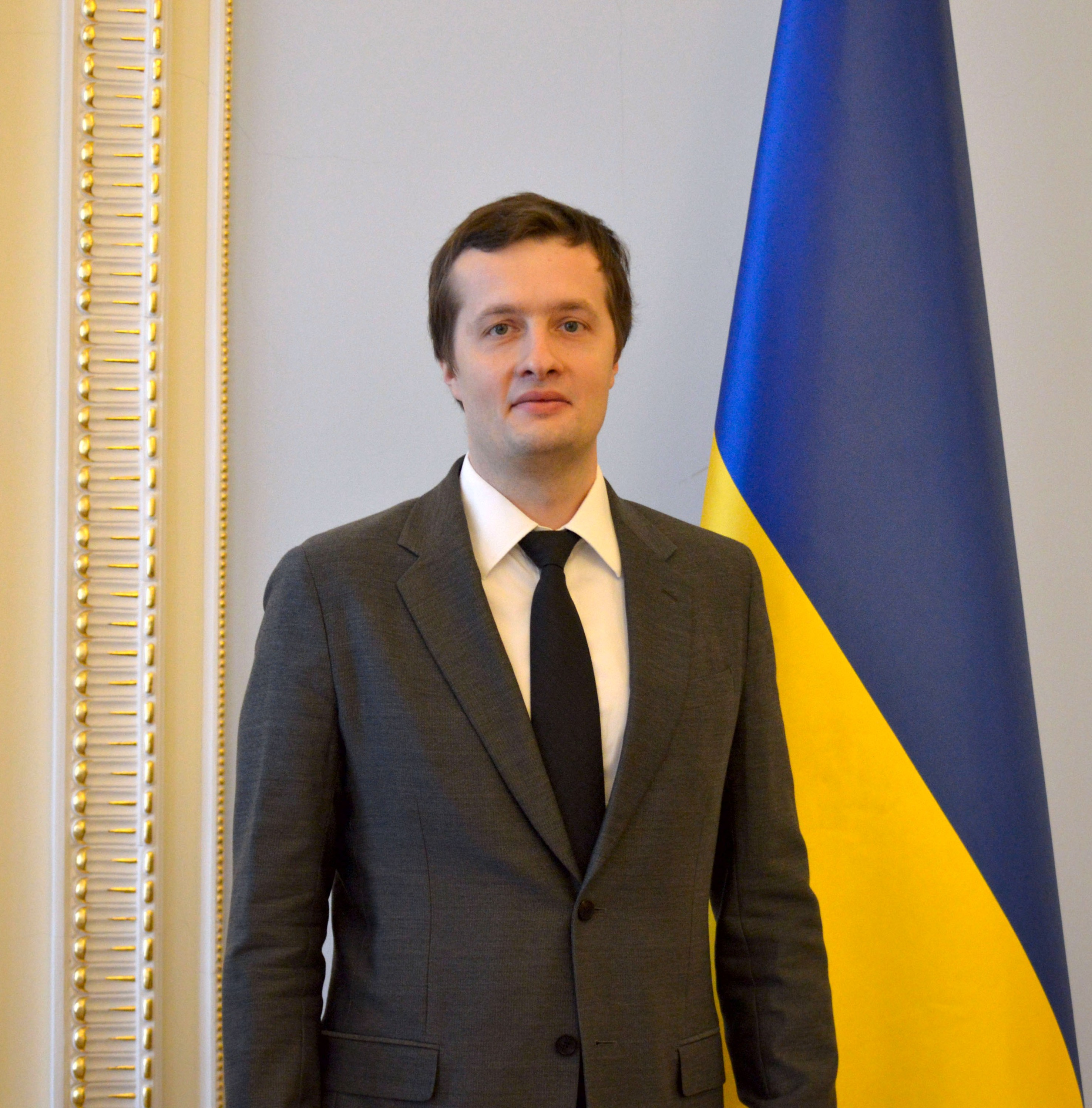 Олексій Порошенко